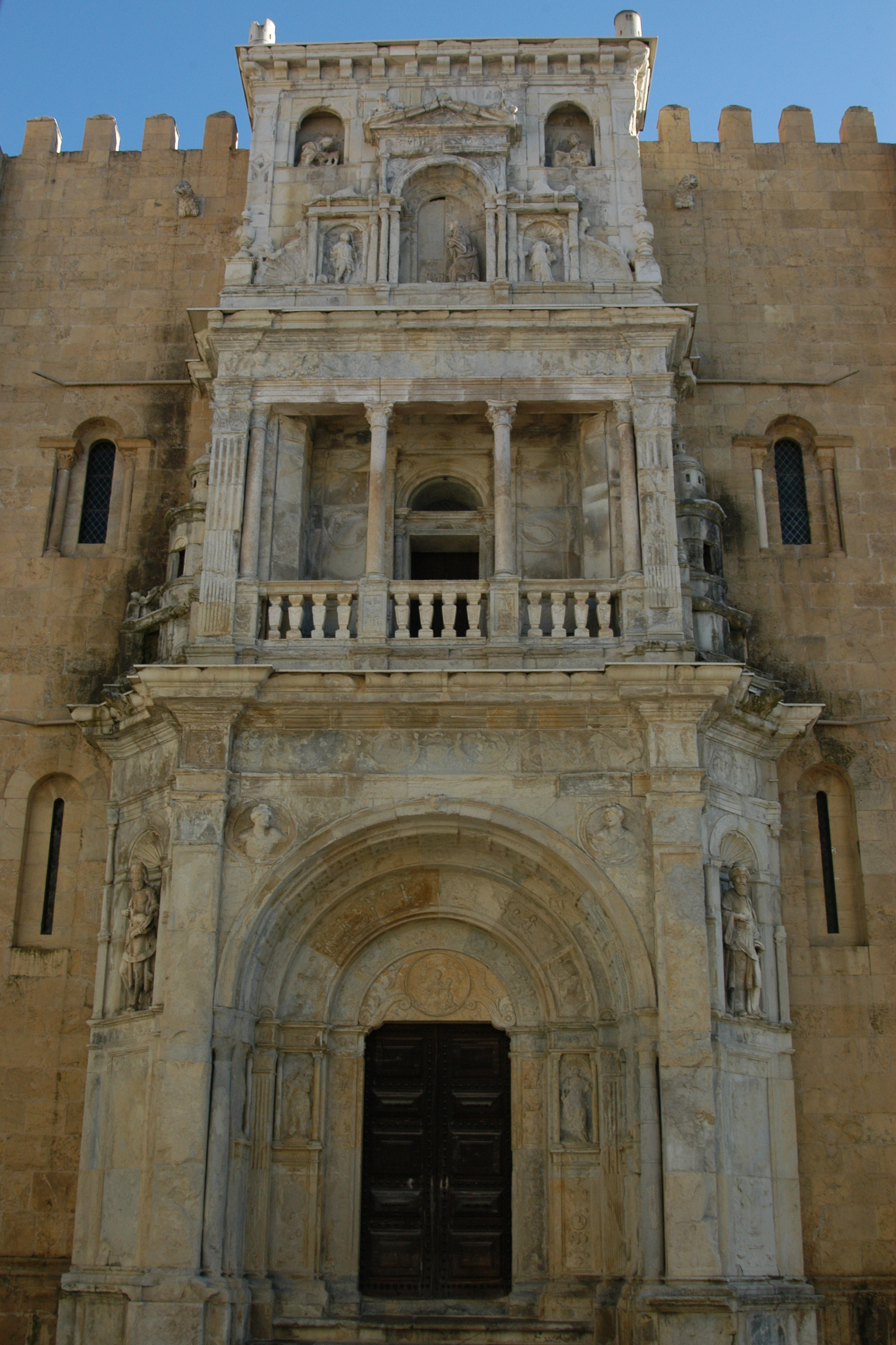 @ Sé Velha, Coimbra